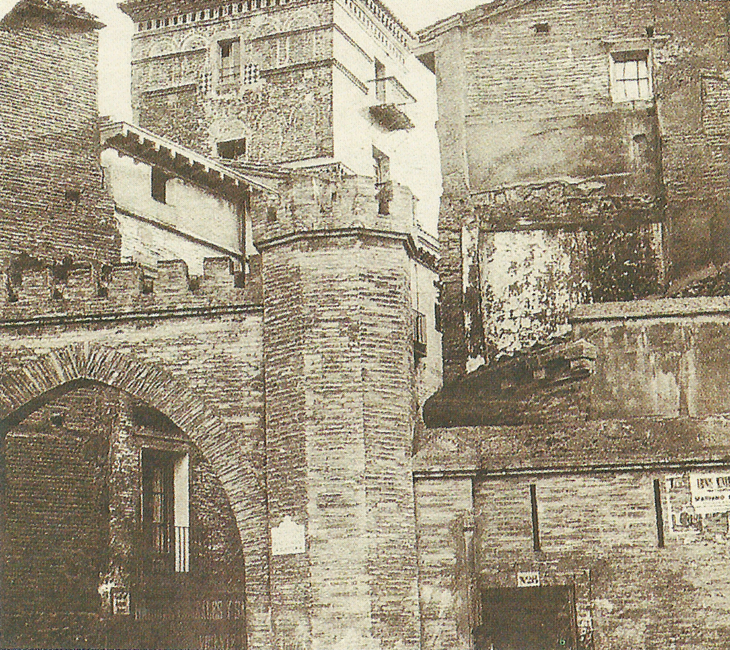 Aragonés: Puerta de Sant Ildefonso (Zaragoza)